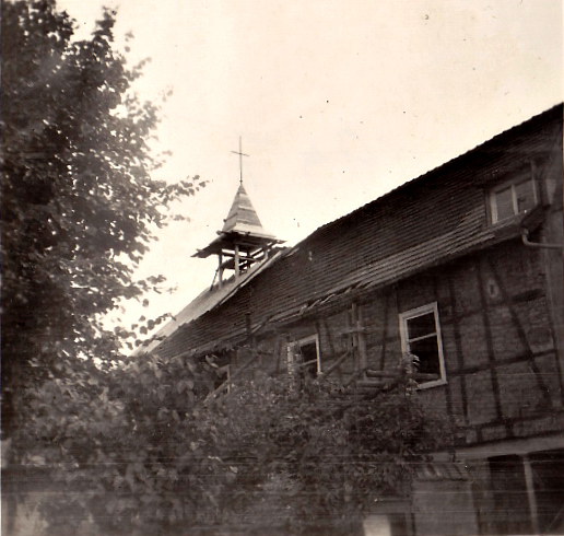 Turmbau 1960er